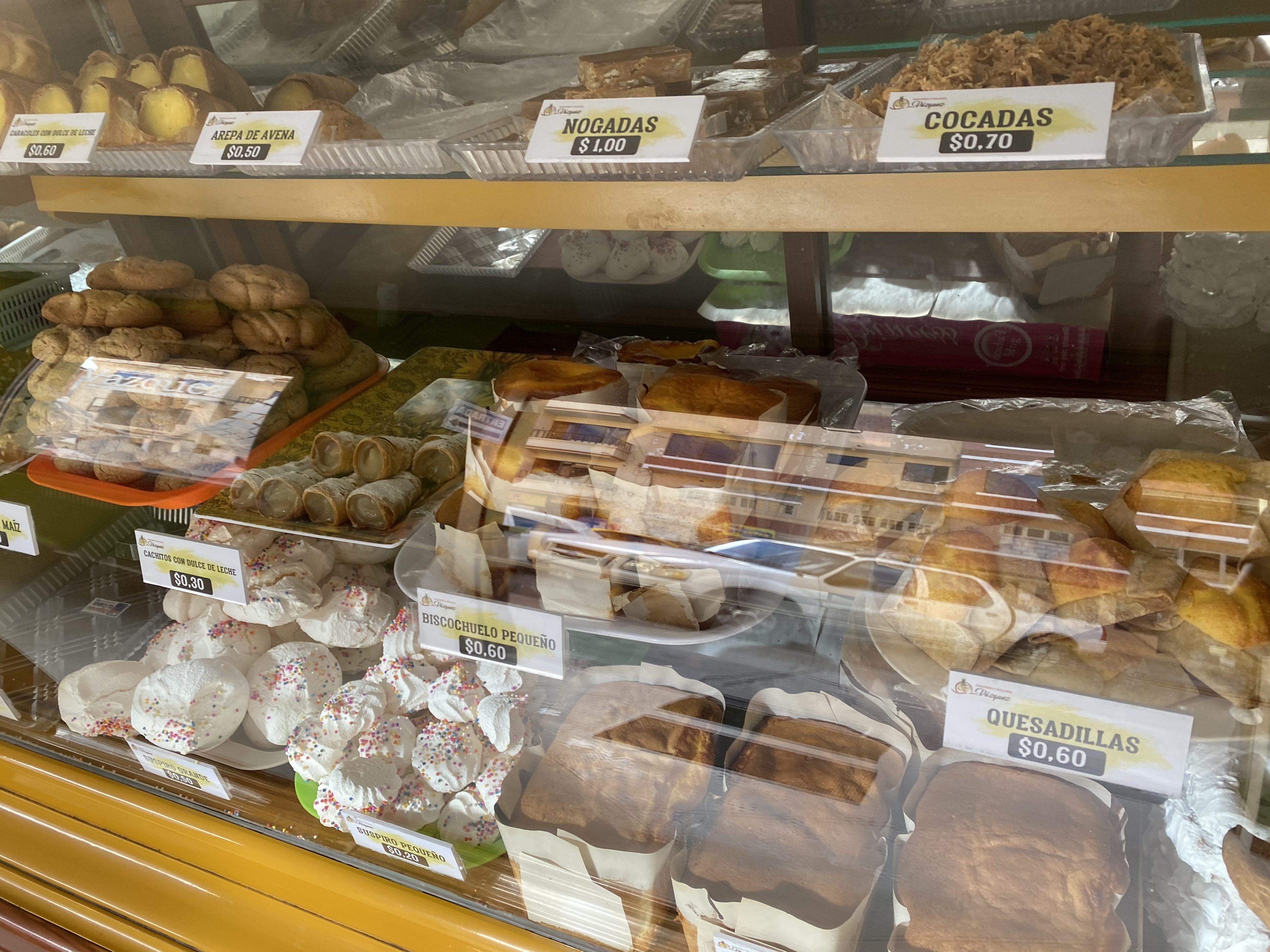 Los dulces que se ven son: biscochuelos, quesadillas, cachitos con dulce de leche, arepa de avena, etc.